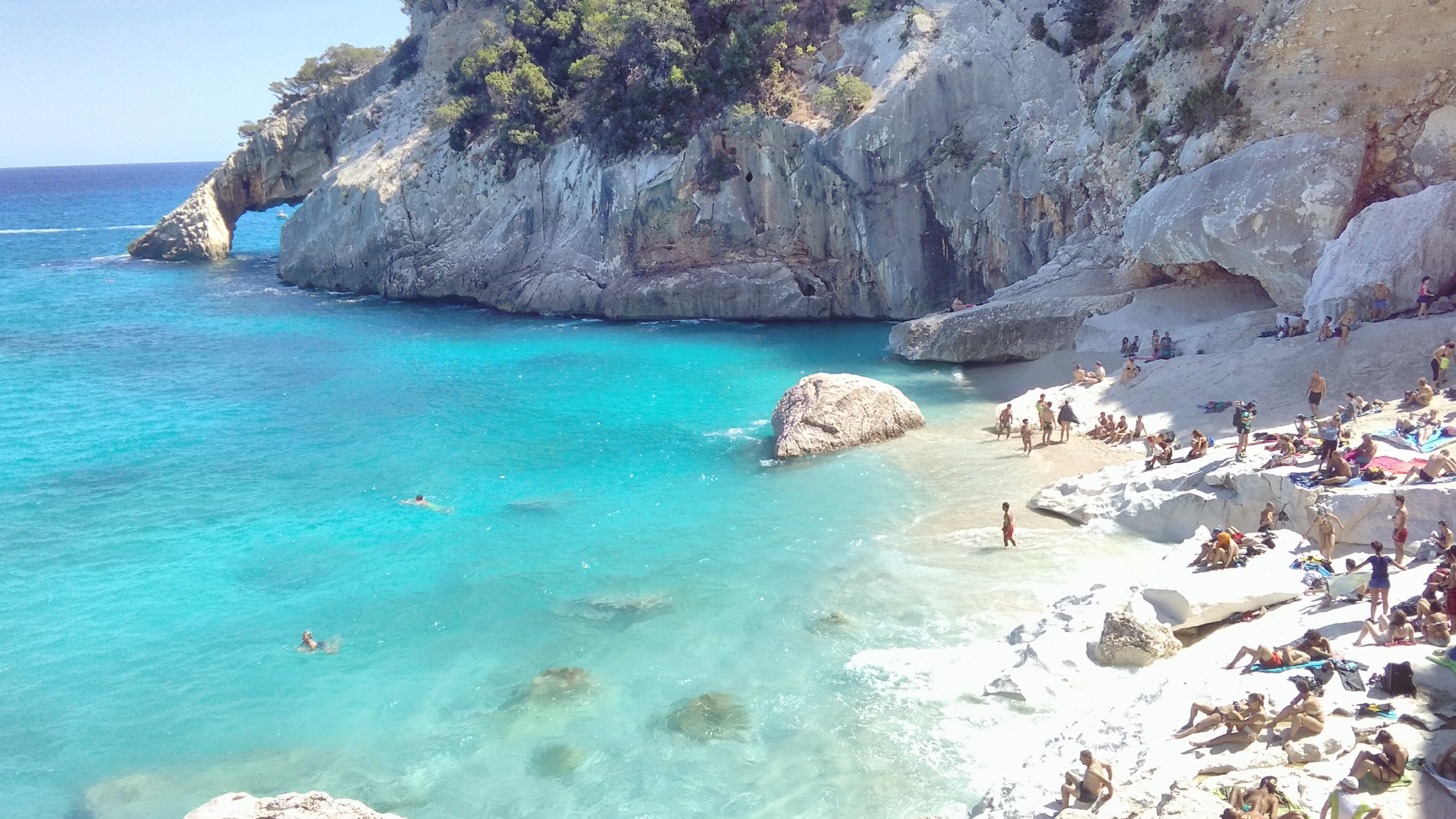 Cala Goloritzè